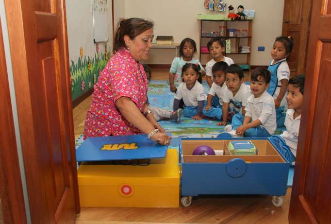 Los niños aprenden con juegos para mejorar su potencial y su sociabilidad.